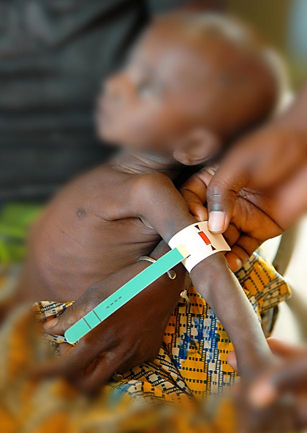 In Krisengebieten setzt World Vision -- ebenso wie andere Hilfswerke -- sogenannte "MUAC"-Bänder ein, um schnell bei einer großen Zahl von Kindern zu bestimmen, wie weit die Unterernährung fortgeschritten ist. Als kritische Grenze des Oberarmumfangs bei bis zu 5-jährigten Kindern gelten 11 cm.